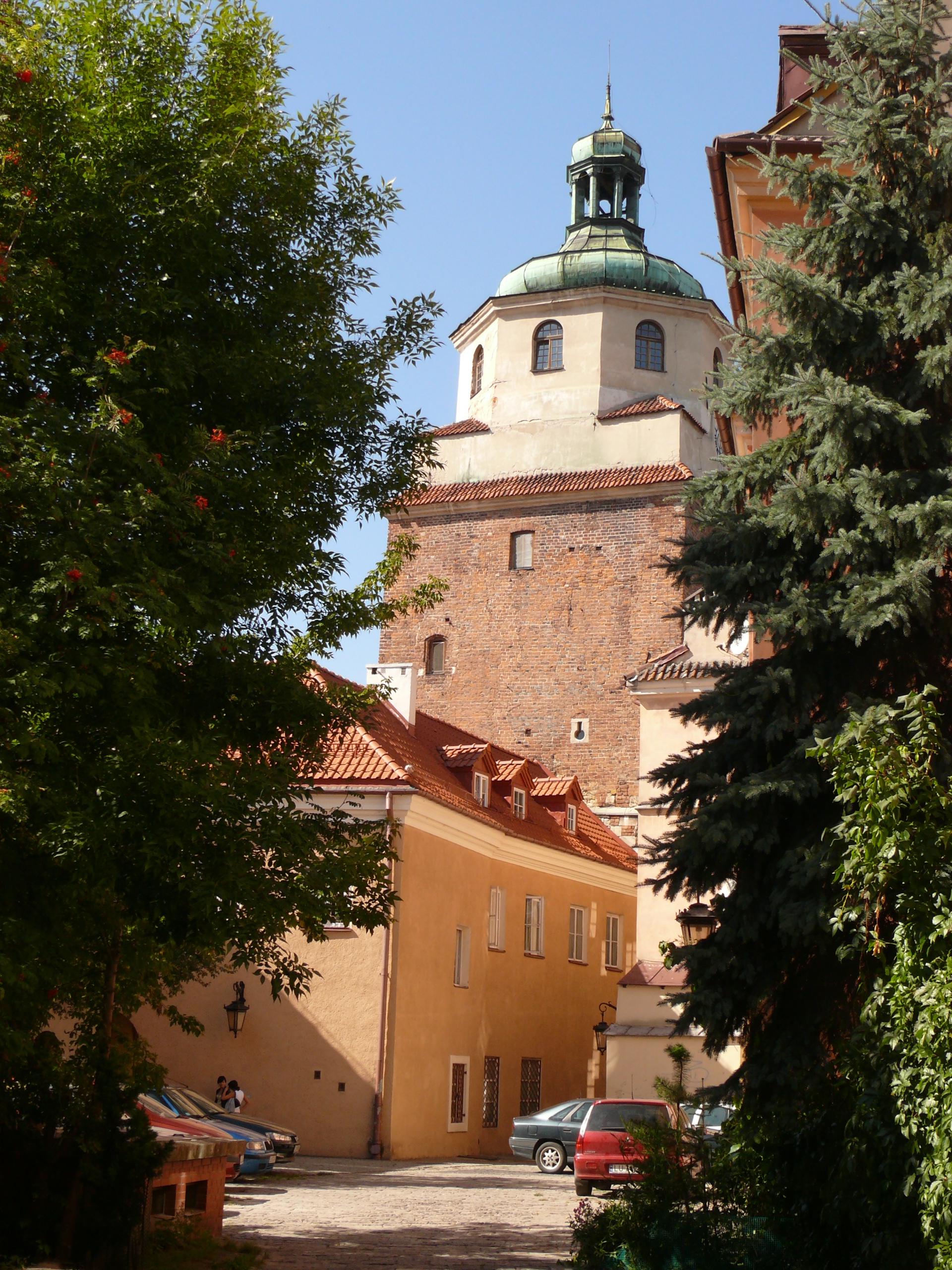 Widok na bramę Krakowską od podwórza ul. Jezuickiej.